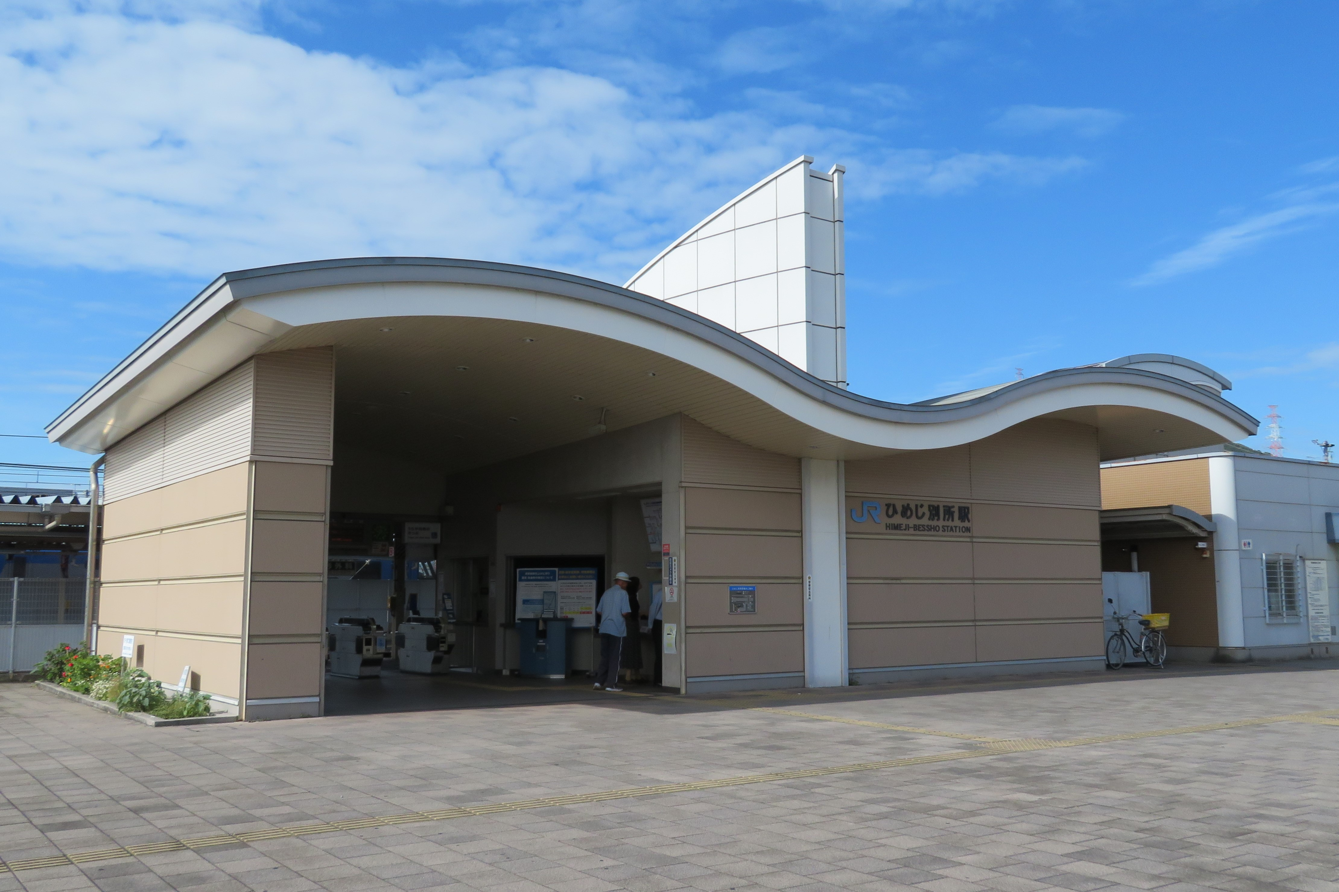 ひめじ別所駅